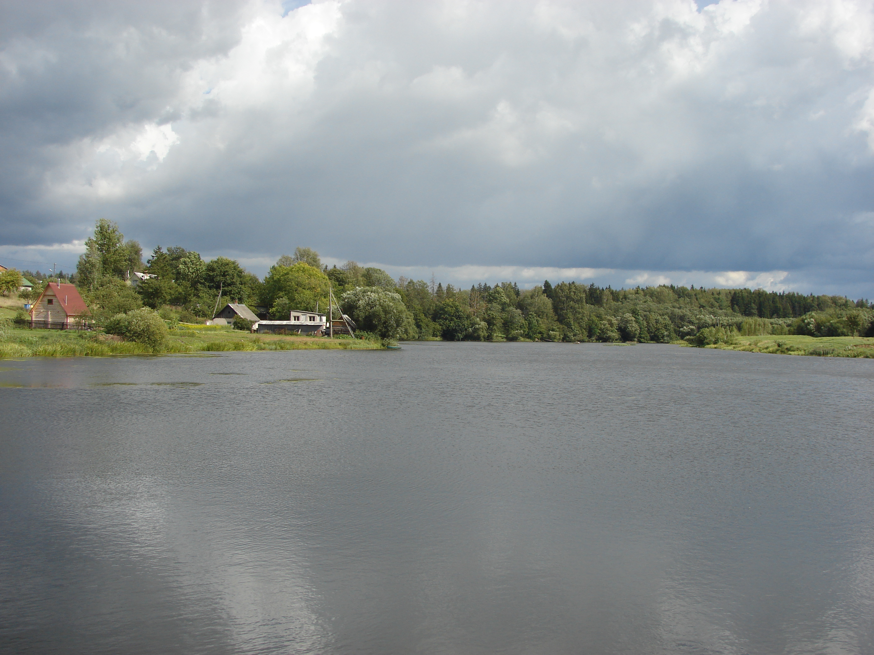 Malta; Viļānu HES ūdenskrātuve, Viļāni, Viļānu novads, Latvia